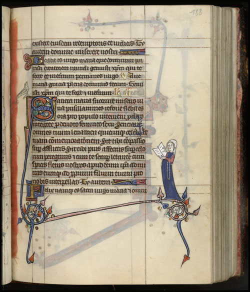 Les Très Riches Heures de Metz (feuillet 188). Metz, vers 1300-1310. Ces heures à l’usage de Metz ont été réalisées pour une femme actuellement non identifiée mais qui sans aucun doute faisait partie d’une des grandes lignées féodales possessionnées dans les limites du diocèse. Avec les motifs décoratifs se développant sur toutes les pages, l’artiste expose ici la gamme complète de son répertoire bien reconnaissable. C'est le plus remarquable des nombreux manuscrits regroupés autour de la charte de Sainte-Glossinde de 1293 (conservée à Metz). Le peintre (qui demeure à ce jour inconnu) a pu commencer son activité dès 1276 avec le Thomas de Cantimpré (Paris, BnF, lat. 523A), sa carrière se prolongeant jusqu’en 1311 au moins, avec le pontifical de Strasbourg (Vienne, ÖNB Ms 1814). 258 feuillets sur vélin. Metz, BM, Ms 1588.